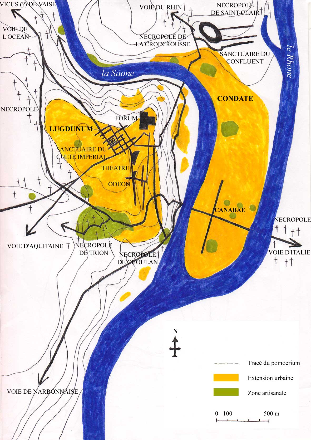 vue de Lyon, époque romaine, avec les zones urbanisées, constructions principales, nécropoles, voies romaines